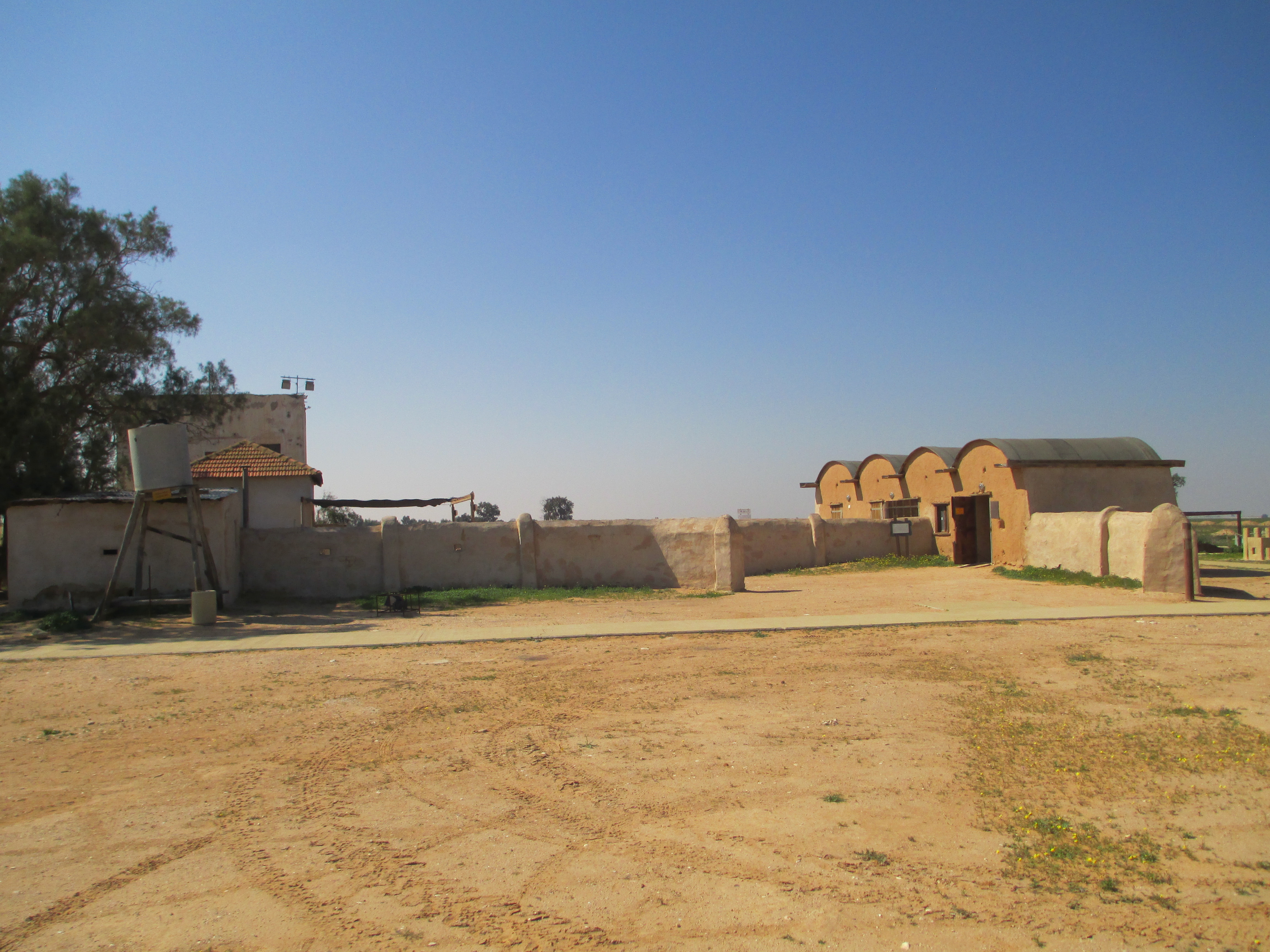 מצפה גבולות